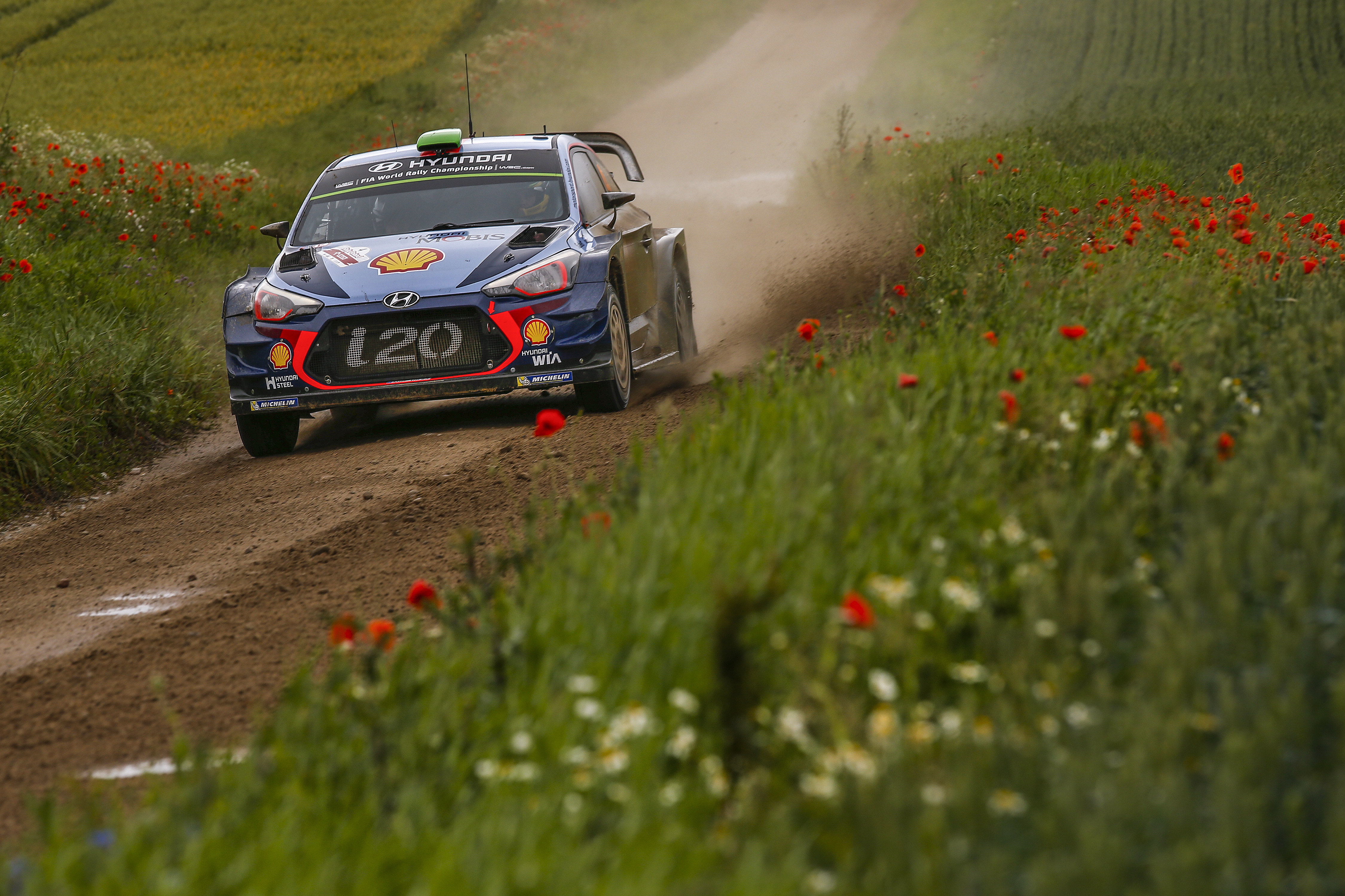 Hayden Paddon podczas Rajdu Polski 2017